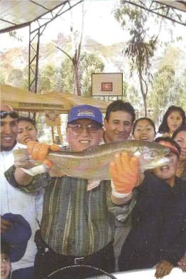 Fotografia del Ing. julian Barra Catacora